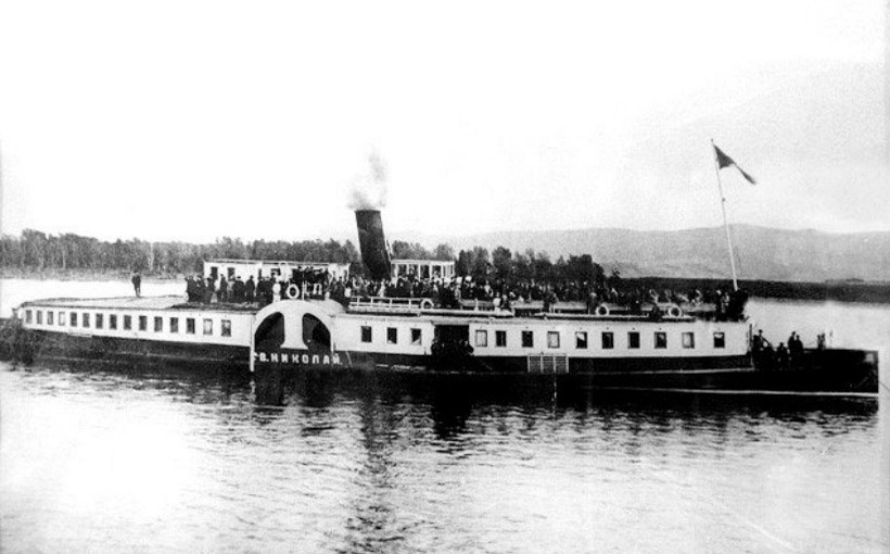 Пароход «Святитель Николай» на Енисее, Российская империя.